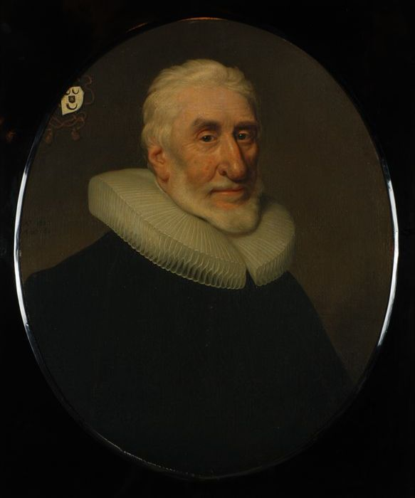 Ovaal portret van Johan (Jan) de Groot